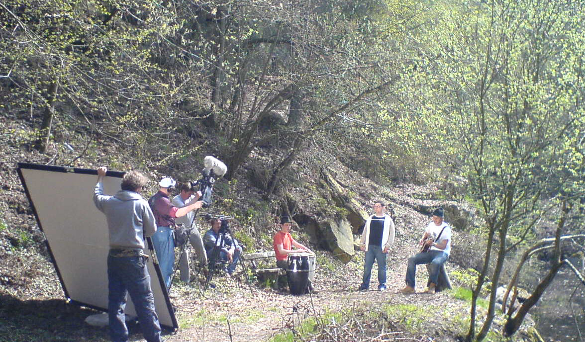 Dreharbeiten des Bayerischen Rundfunks mit Da Huawa, da Meier und I am Blauen See 2006